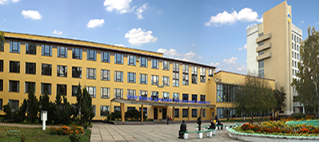 Чернігівський державний технологічний університет